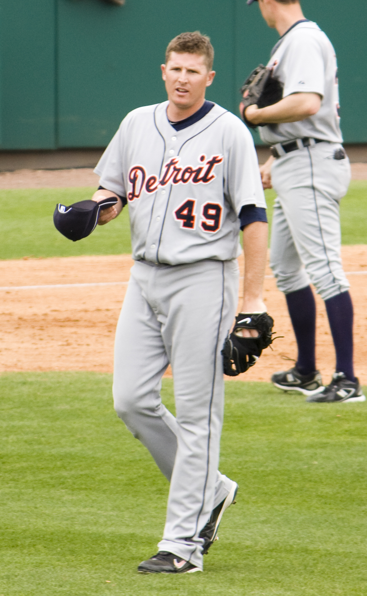 Eddie Bonine